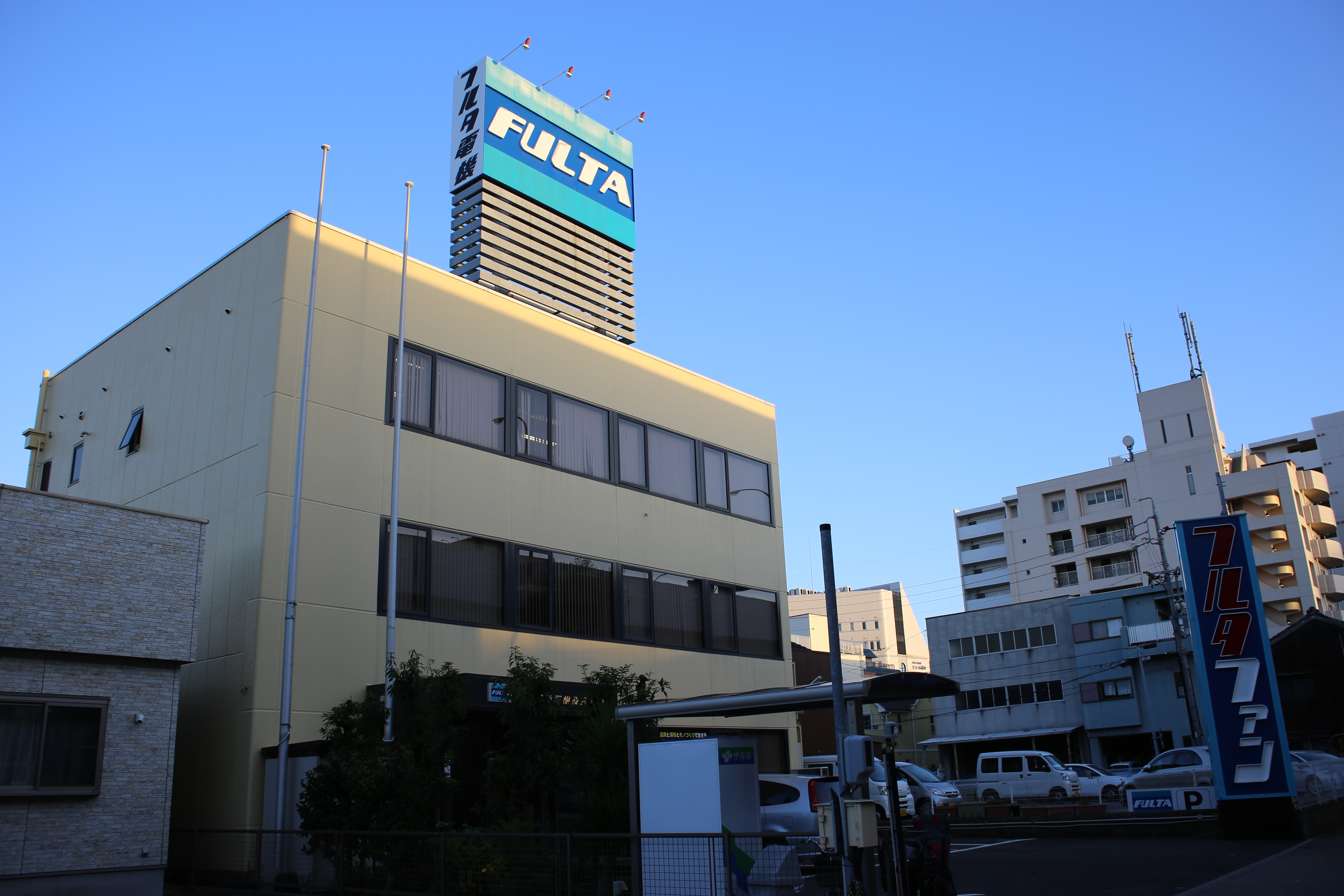 名古屋市瑞穂区堀田通のフルタ電機本社を西側公道北側より撮影